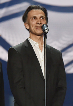 Премия Золотая маска - 2017 года